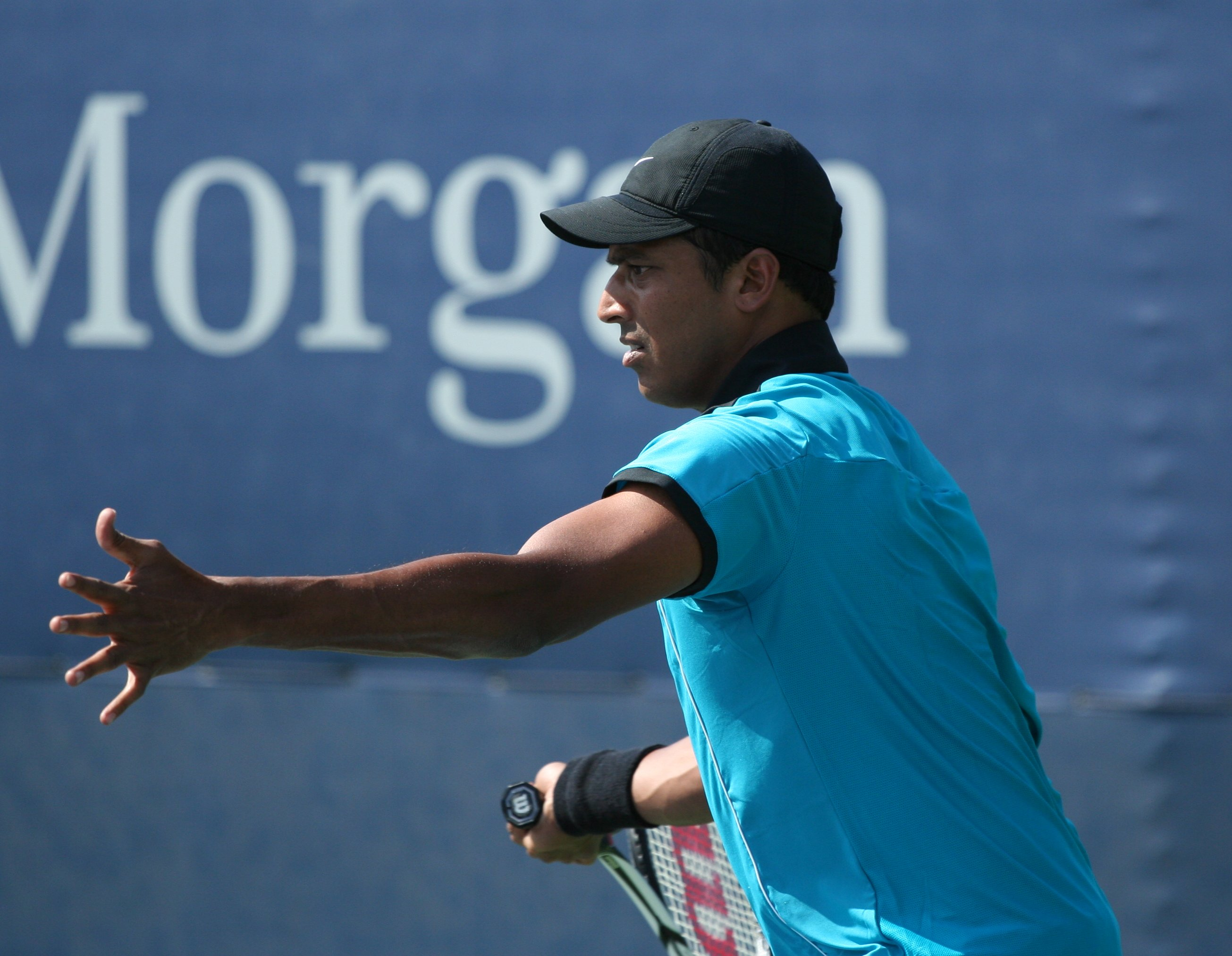 U.S. Open Saturday, Sept. 5, 2009